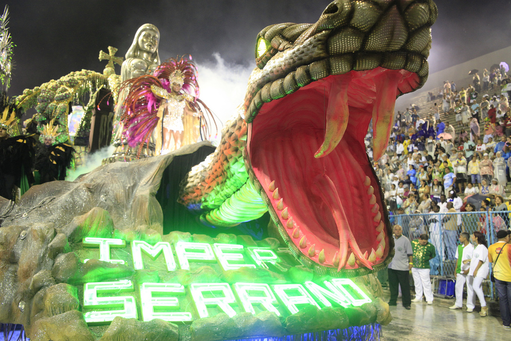 Rio de Janeiro - Escolas de samba se apresentam no Sambódromo da Marquês de Sapucaí. (AF Rodrigues/Agência Brasil)